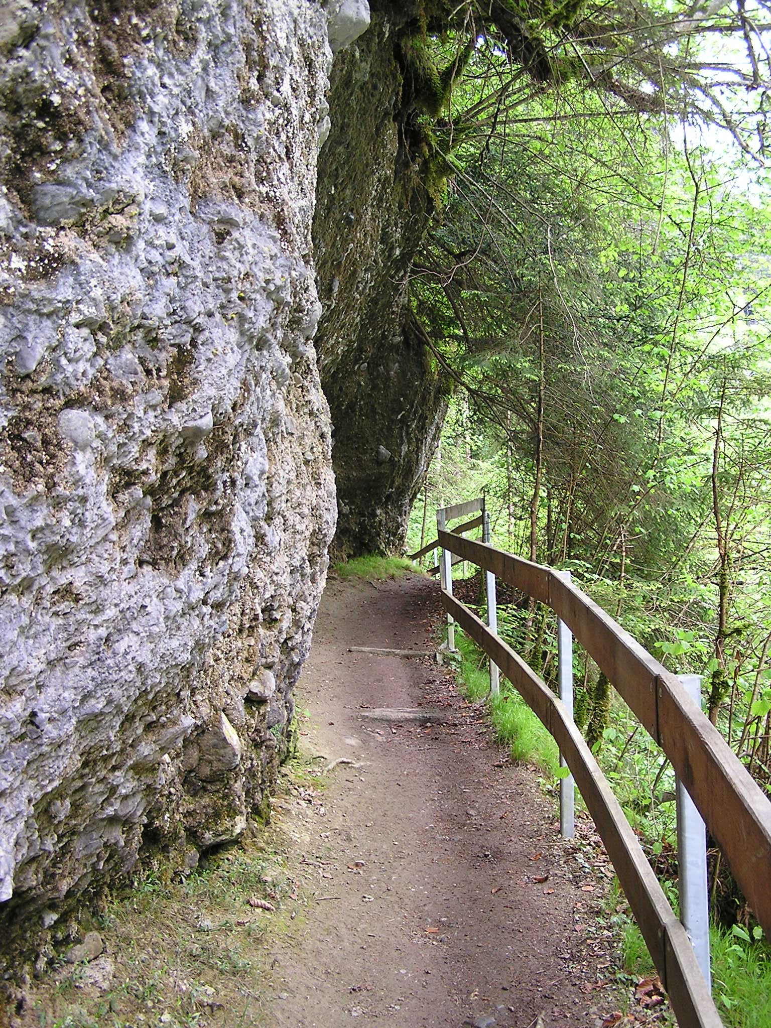 Bürser Schlucht Ort & Datum: 21.05.2006